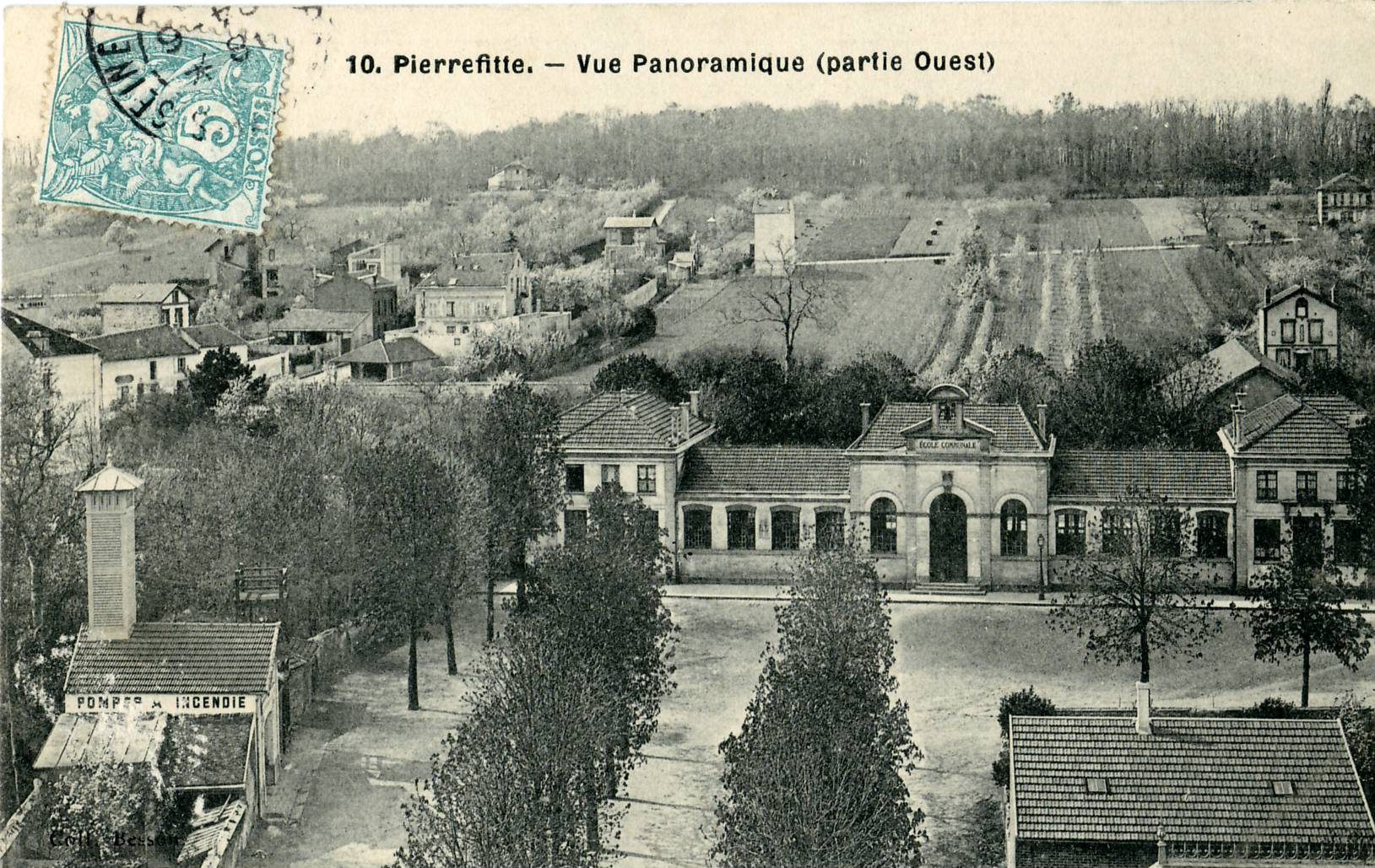 Carte postale ancienne : PIERREFITTE : Vue Panoramique (partie ouest) Au fond, on distingue la Butte-Pinson